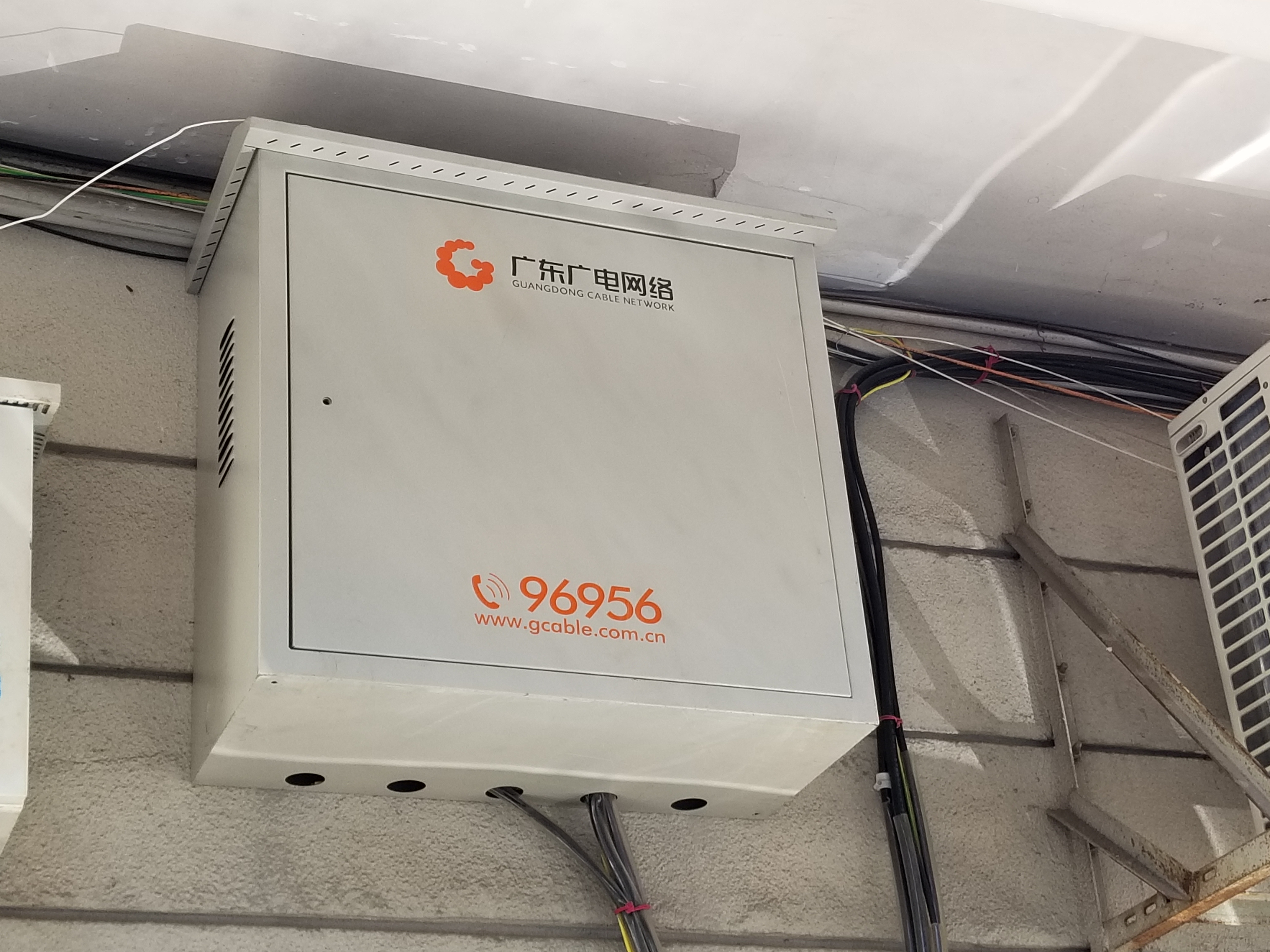 广东广电网络新分线箱